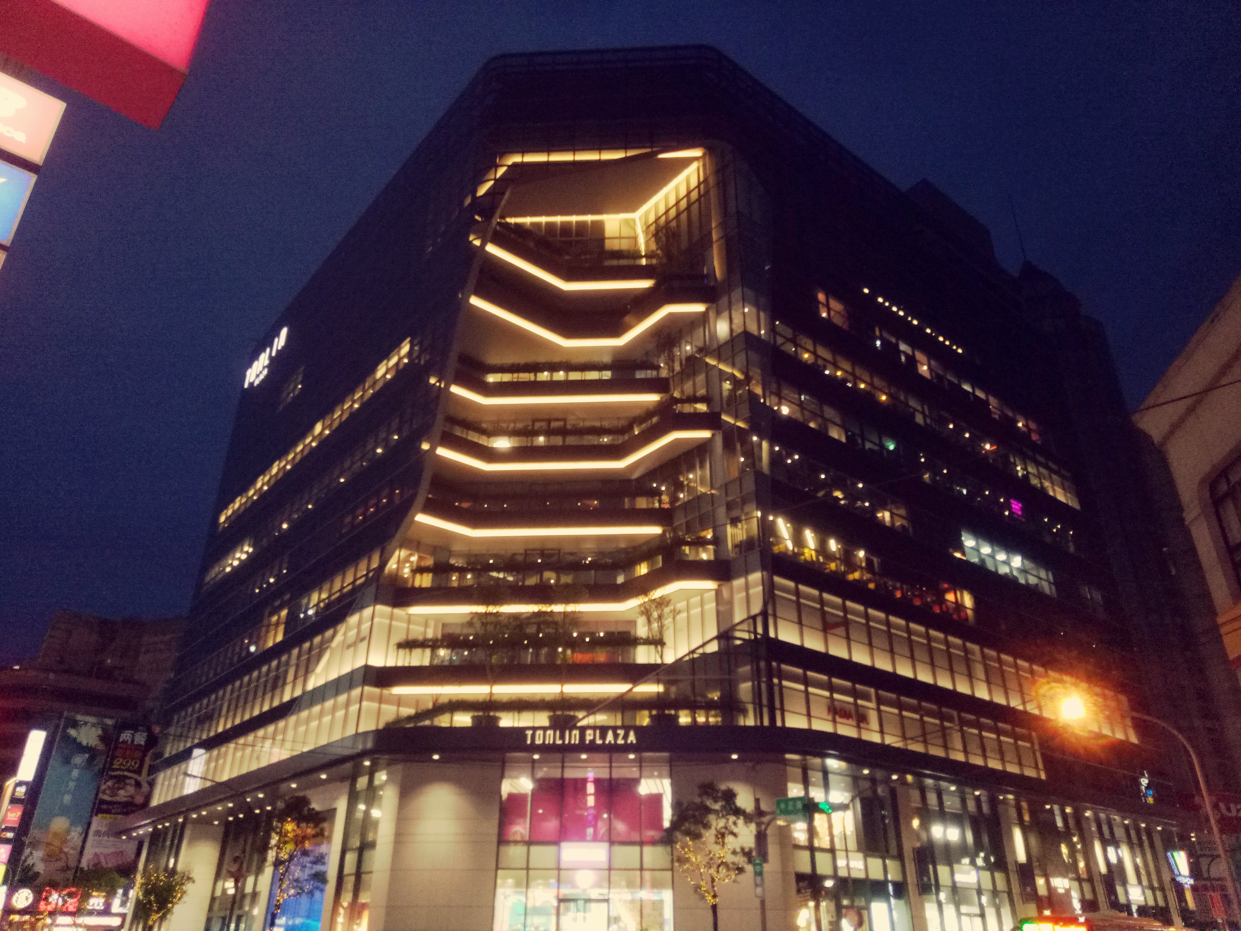 桃園市 統領廣場（夜景）。